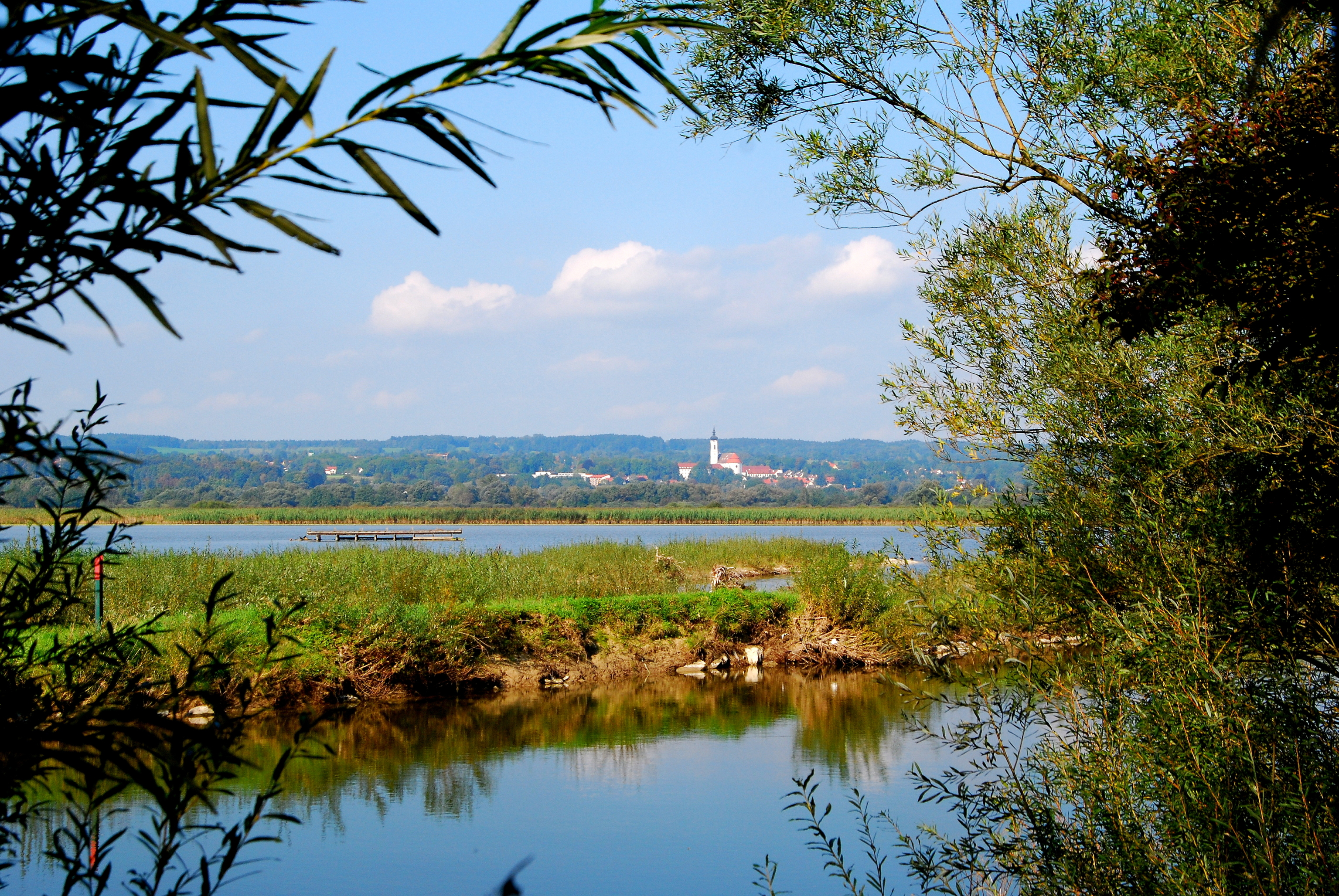 Naturschutzgebiet „Vogelfreistätte Ammersee-Südufer“; am gegenüber liegenden Ufer Dießen am Ammersee.